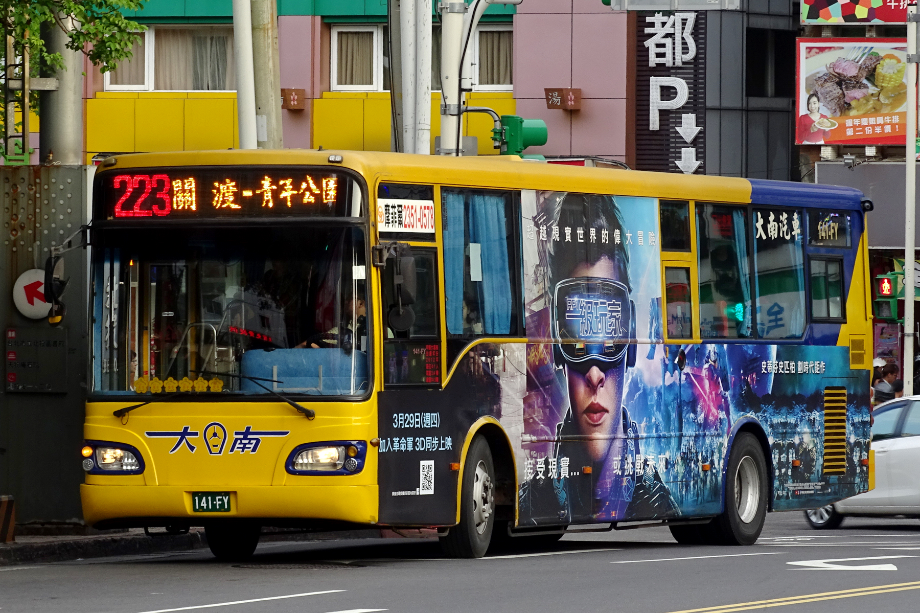 HINO - RK8JRSA - 141-FY